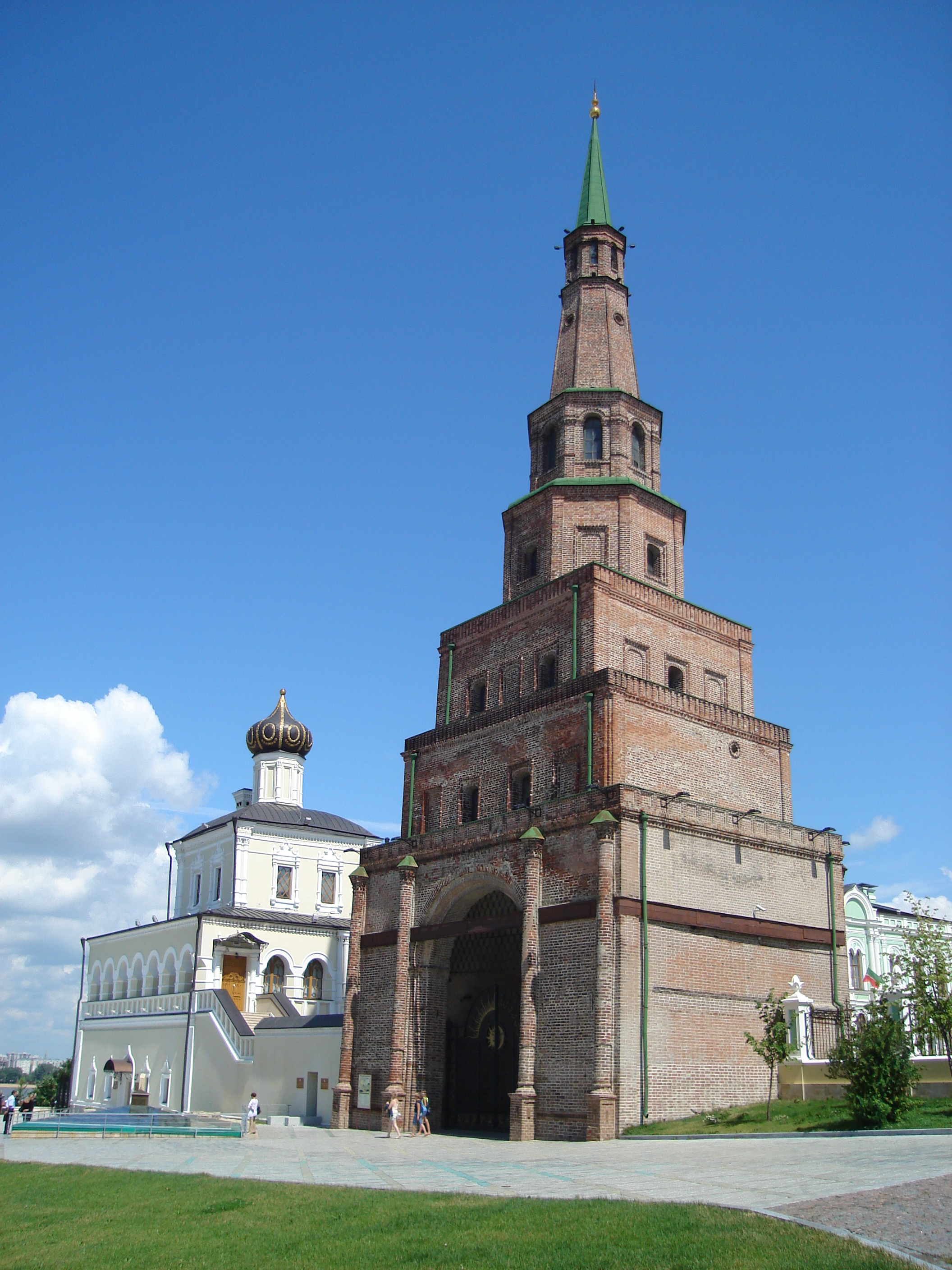 Söyembikä Tower